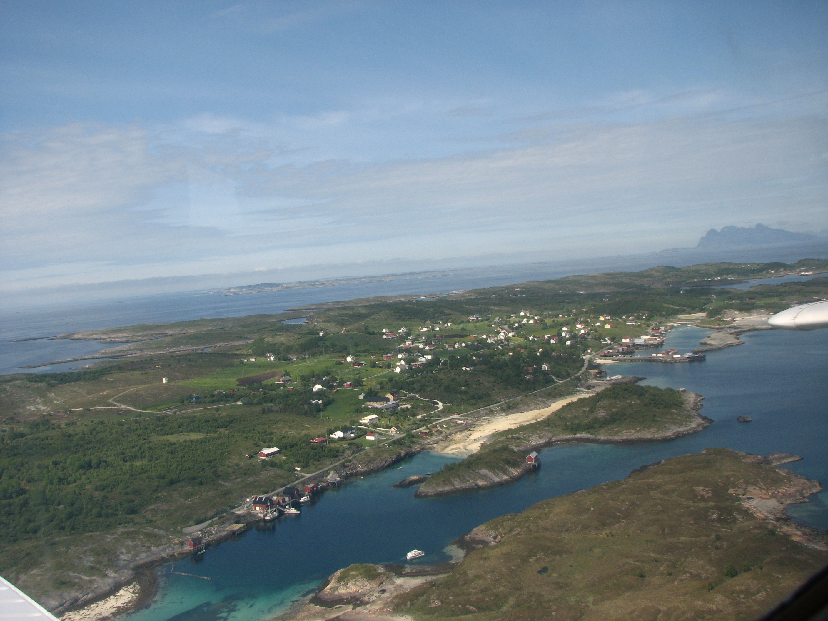 Sørarnøya i Gildeskål